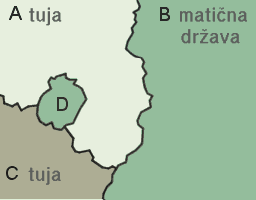 Zgled eksklave, ki ni hkrati enklava.